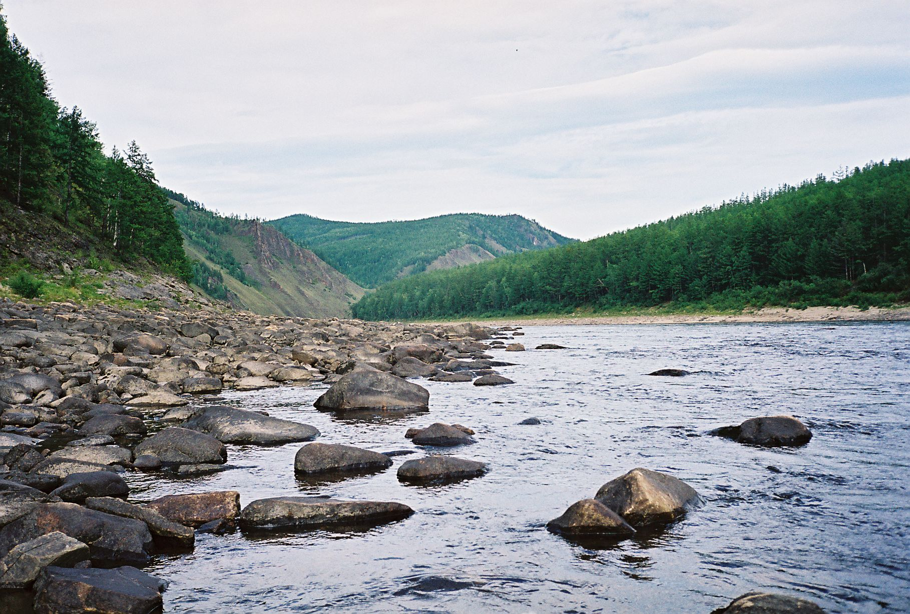 Река Калар, Забайкальский край